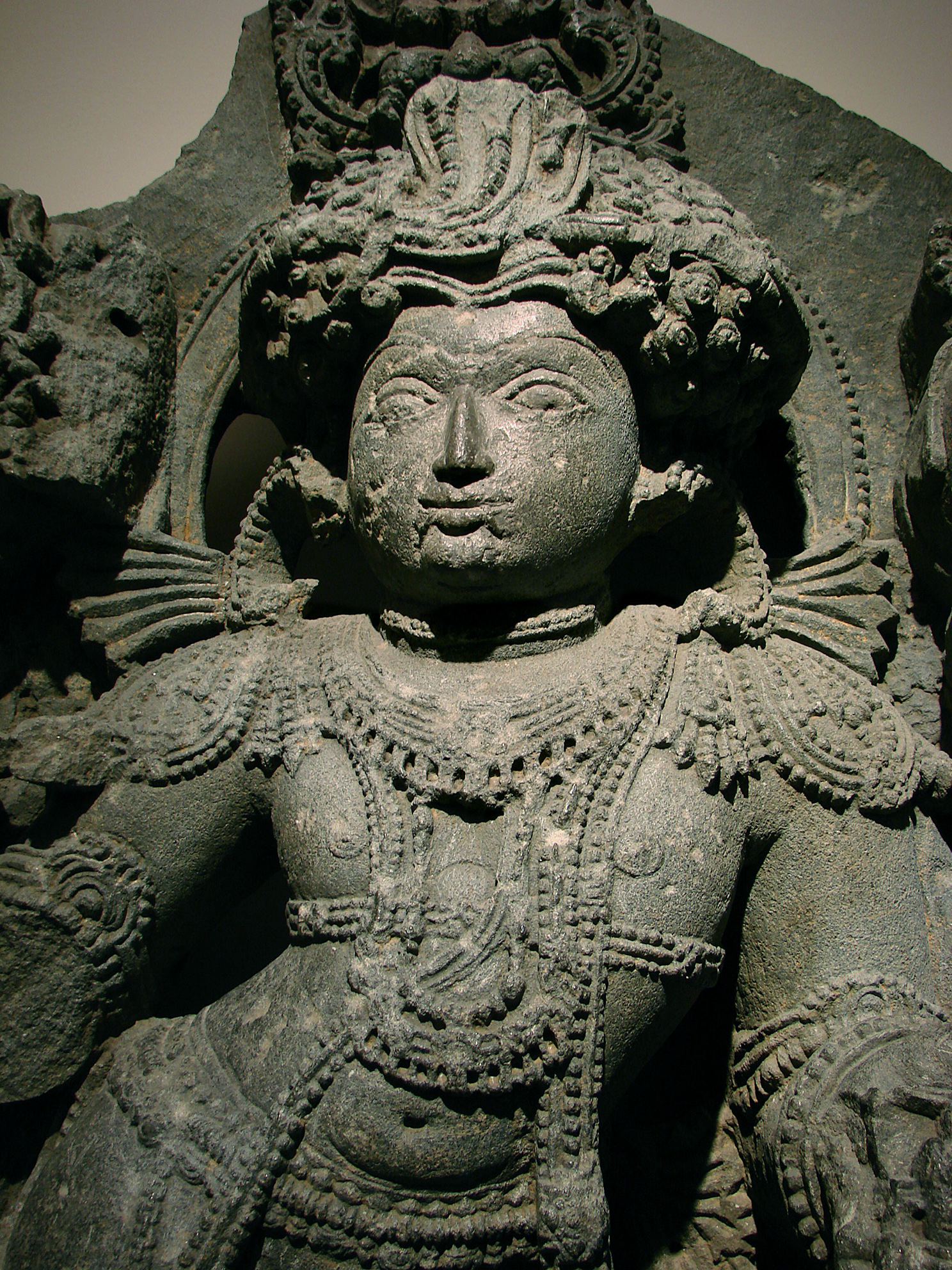 Bhairava, forme terrible de Shiva. Inde, Karnataka, époque Hoysala, 13ème siècle, chloritoschiste. Musée Guimet, Paris.